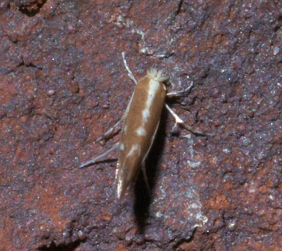 Cameraria quercivorella, Hodges #0835, ID Confidence: 88